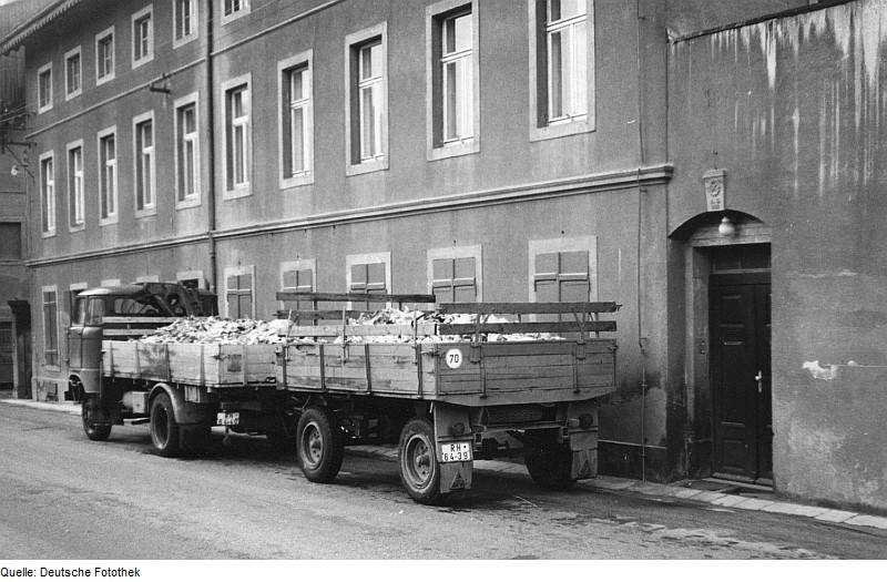 Original image description from the Deutsche FotothekMeißen-Buschbad. Buschmühle, Fahrzeug mit Knochen beladen